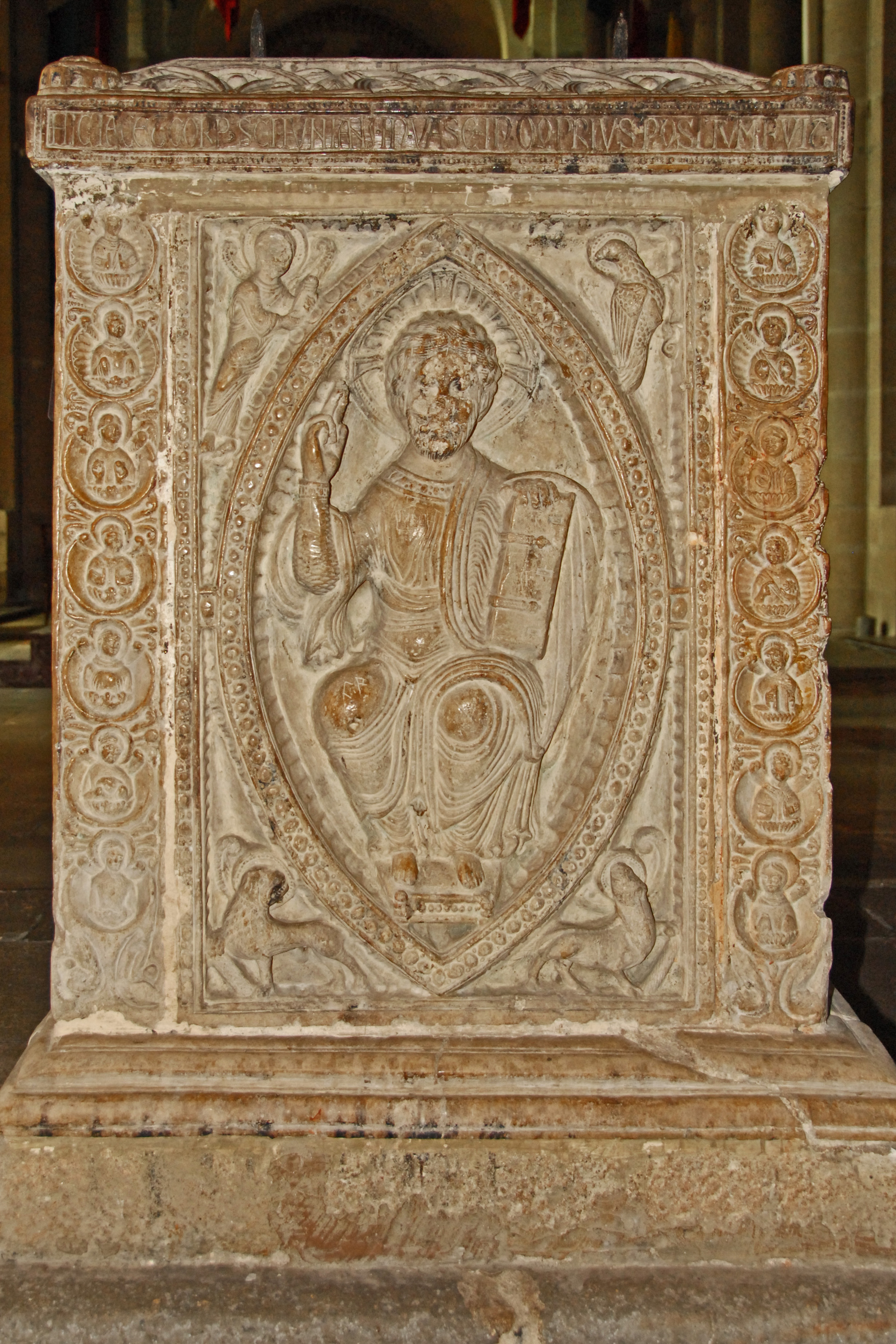 St-Junien, Sarkophag, Ostseite, Der Weltherrscher in der Mandorla